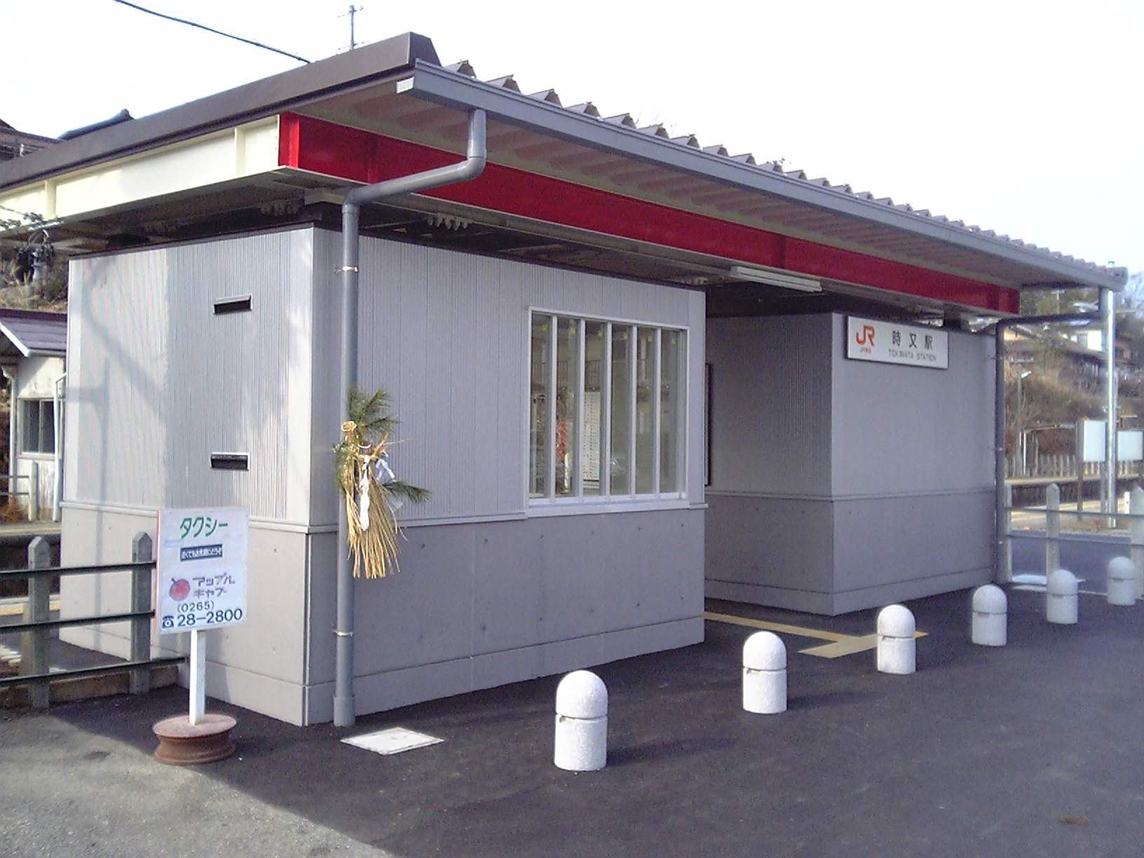 時又駅